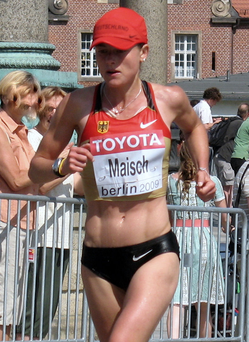 Ulrike Maisch in Berlin, 23.08.2009